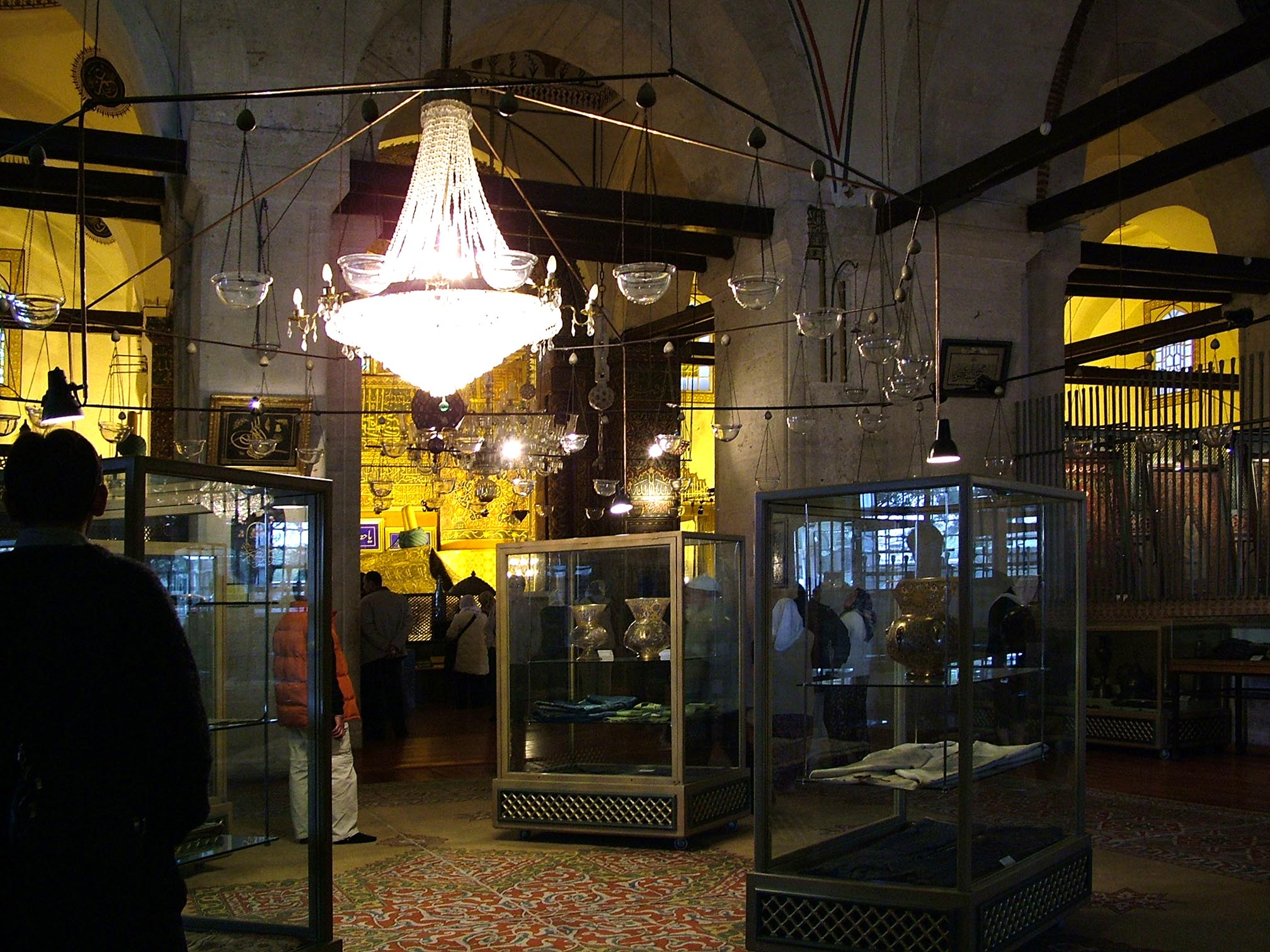 Mevlana kolostormúzeum (Konya, Törökország)